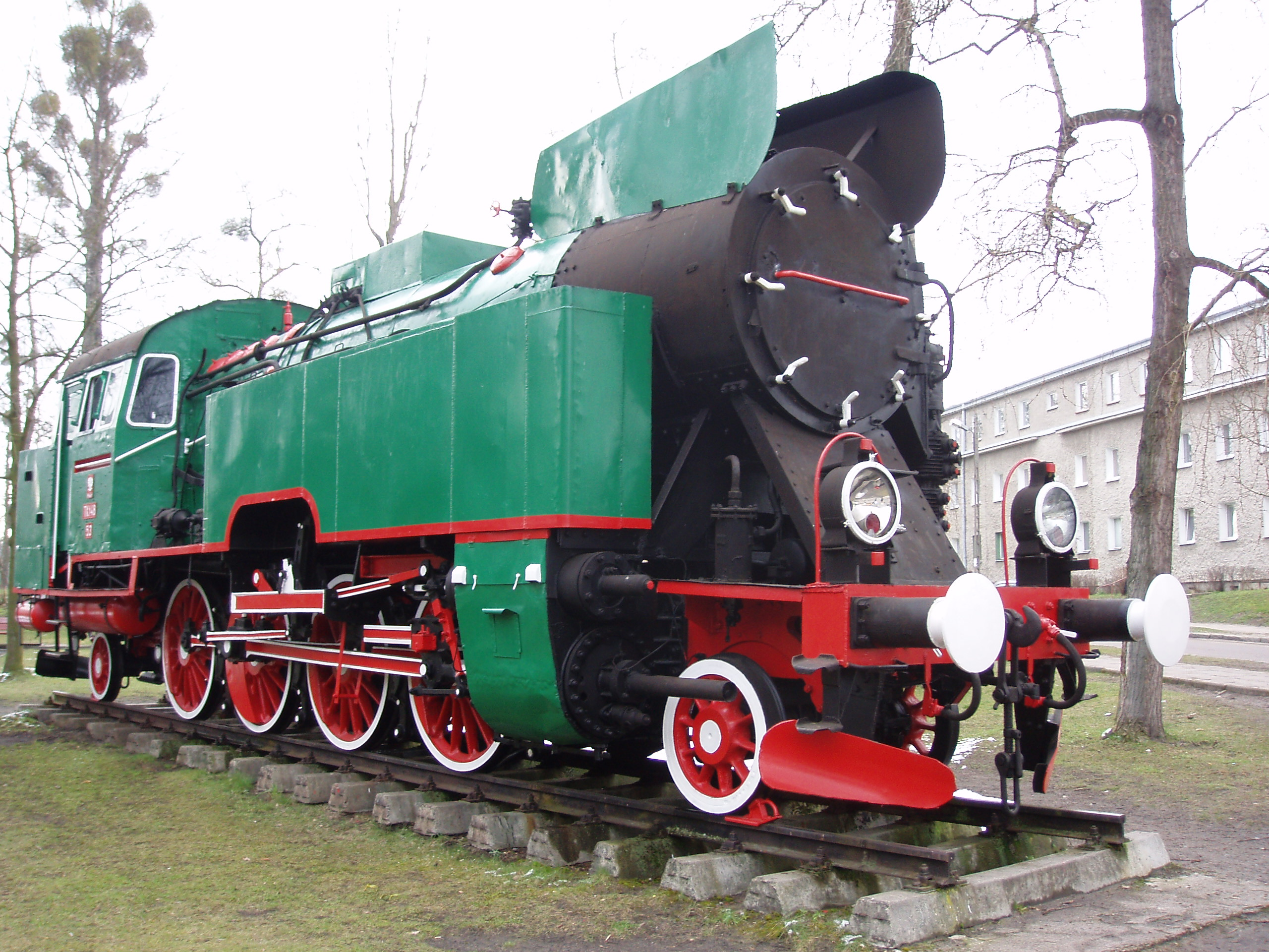 Lokomotywa, dworzec PKP Iława Głowna